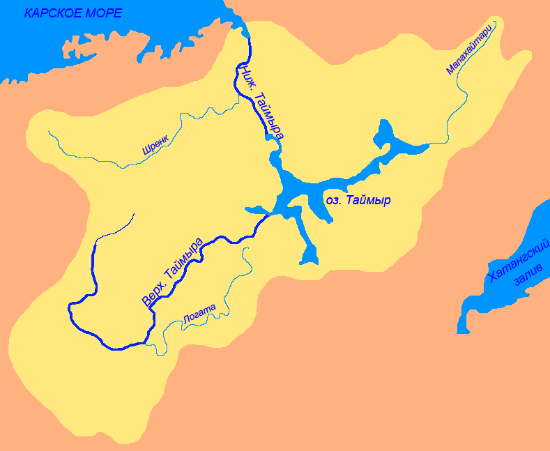 Схема бассейна реки Таймыра